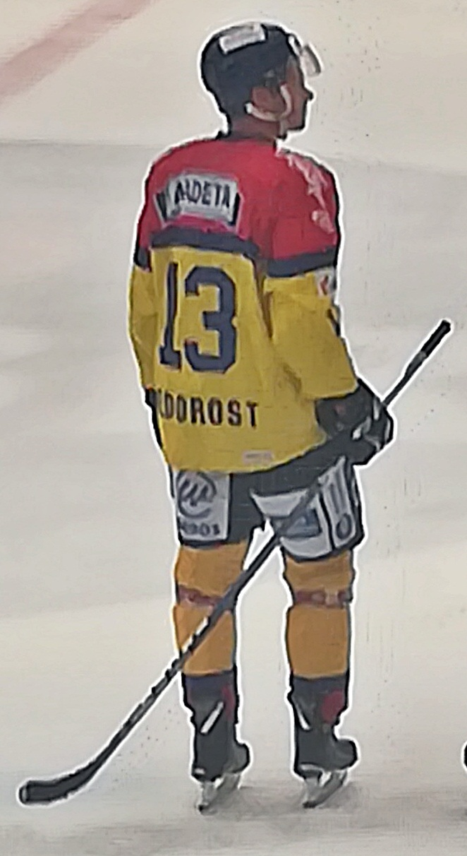 HC Zubr Přerov - ČEZ Motor České Budějovice